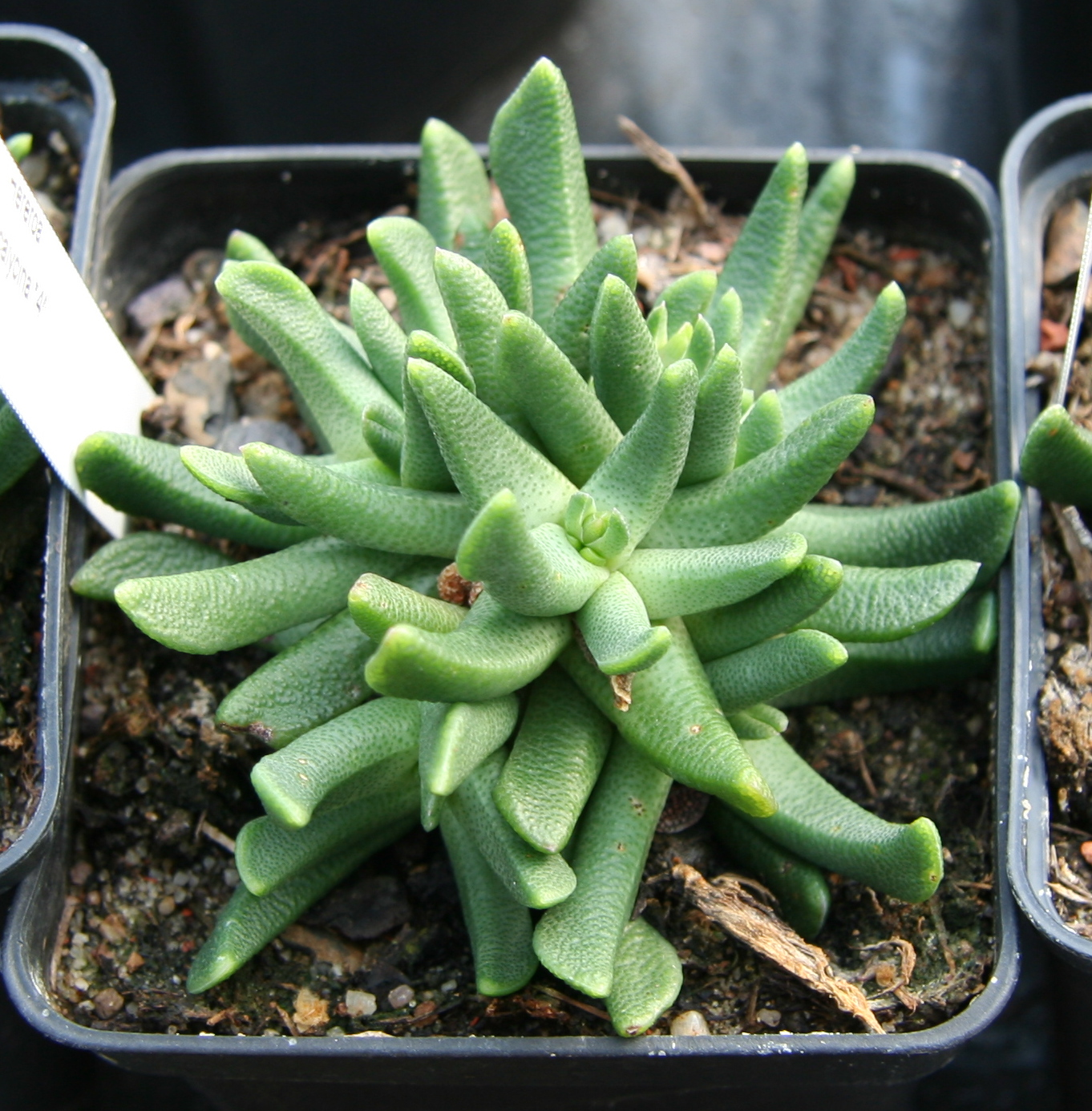 Hereroa calycina in Kultur bei Kakteen-Haage in Erfurt